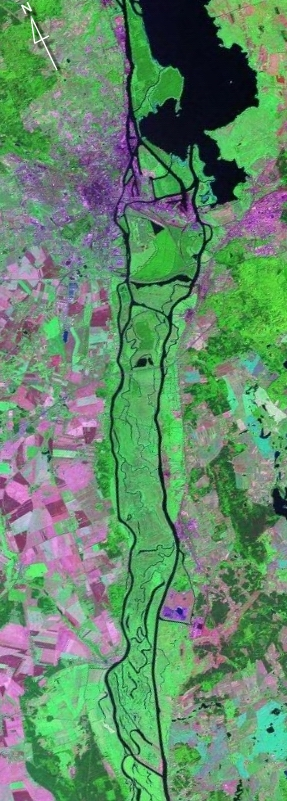 Fotografia satelitarna obszaru Międzyodrza.